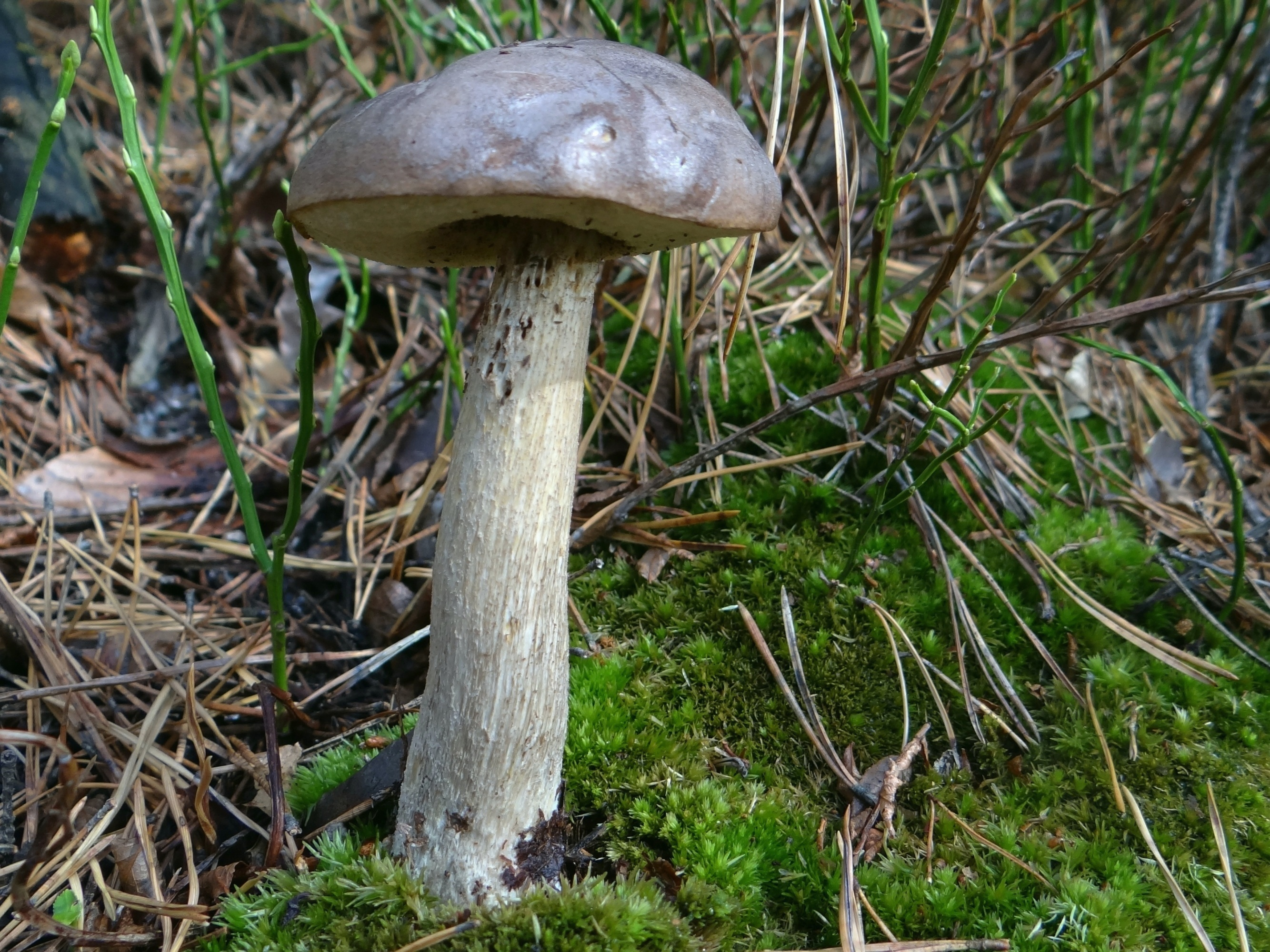 Leccinum variicolor